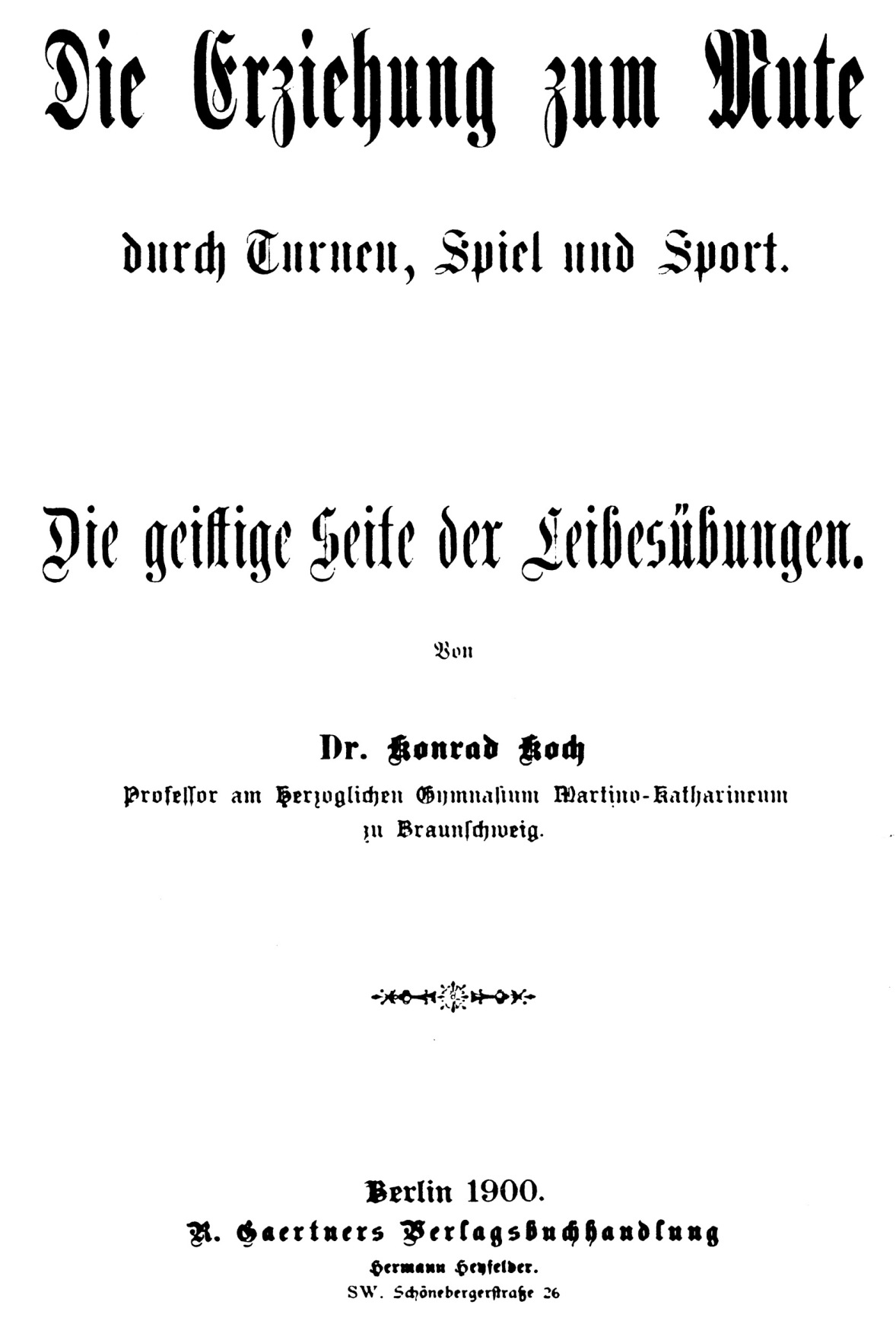 Rechtlicher Hinweis: Die Verwendung der Fotos ist frei für journalistische Zwecke zur Berichterstattung über Braunschweig bei Nennung der Quelle. Bitte schicken Sie ein Belegexemplar an: Braunschweig Stadtmarketing GmbH Schild 4 38100 Braunschweig "Titelseite von Konrad Kochs pädagogischem Hauptwerk von 1900 (Archiv Kurt Hoffmeister) In seinem Werk aus dem Jahre 1900 legte Konrad Koch (1846-1911) ausführlich die pädagogischen Prinzipien der Schulspiele und seines aus der Spielbewegung kommenden Sportverständnisses dar. Spiele dienten seiner Auffassung nach nicht nur zur körperlichen Ertüchtigung, sondern wirkten sich auch positiv auf die intellektuellen Fähigkeiten und den Erwerb von Sozialkompetenz aus."